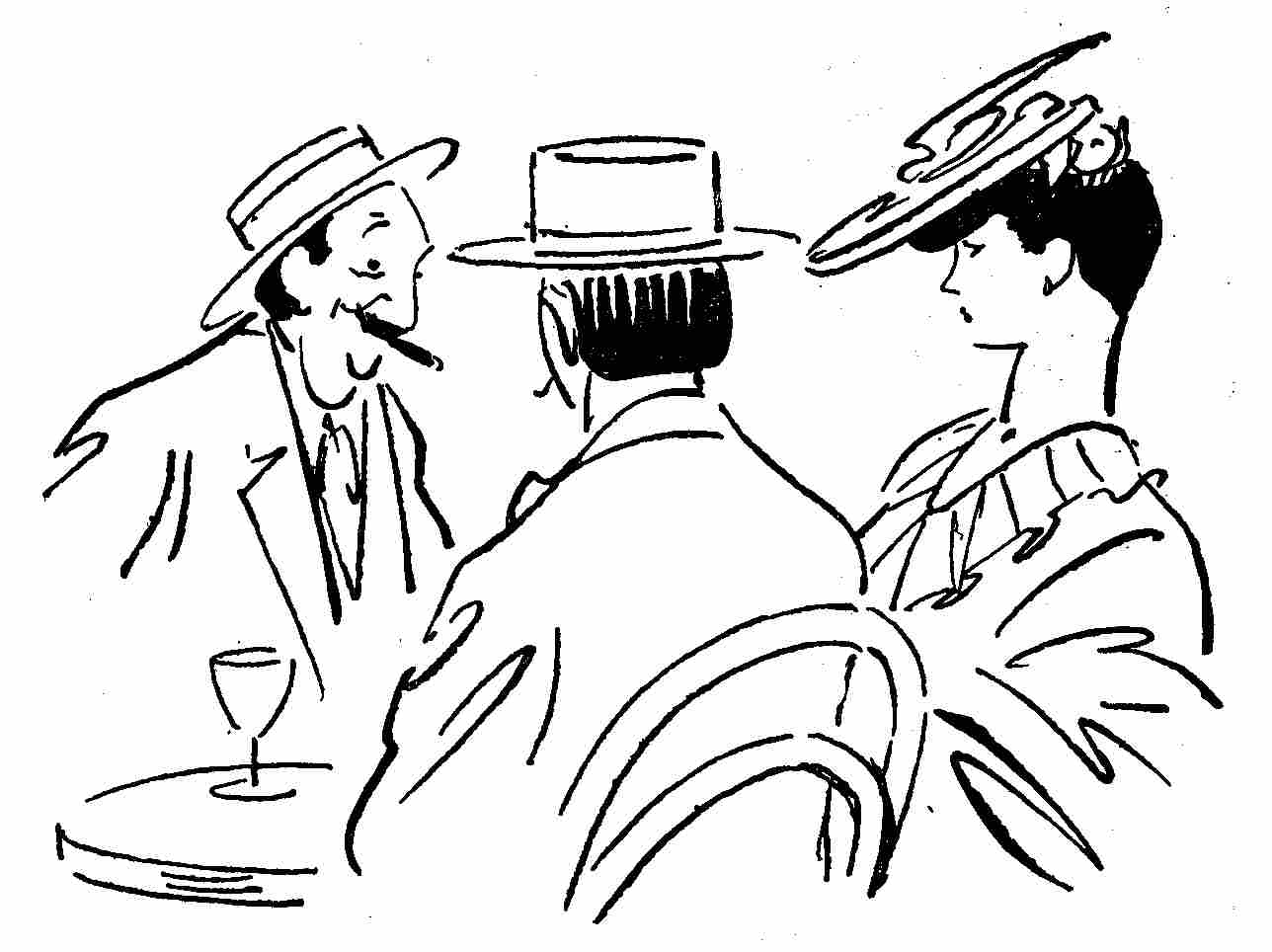 Illustration des Linottes. Deux hommes et une femme assis à une table de café, verre de vin.